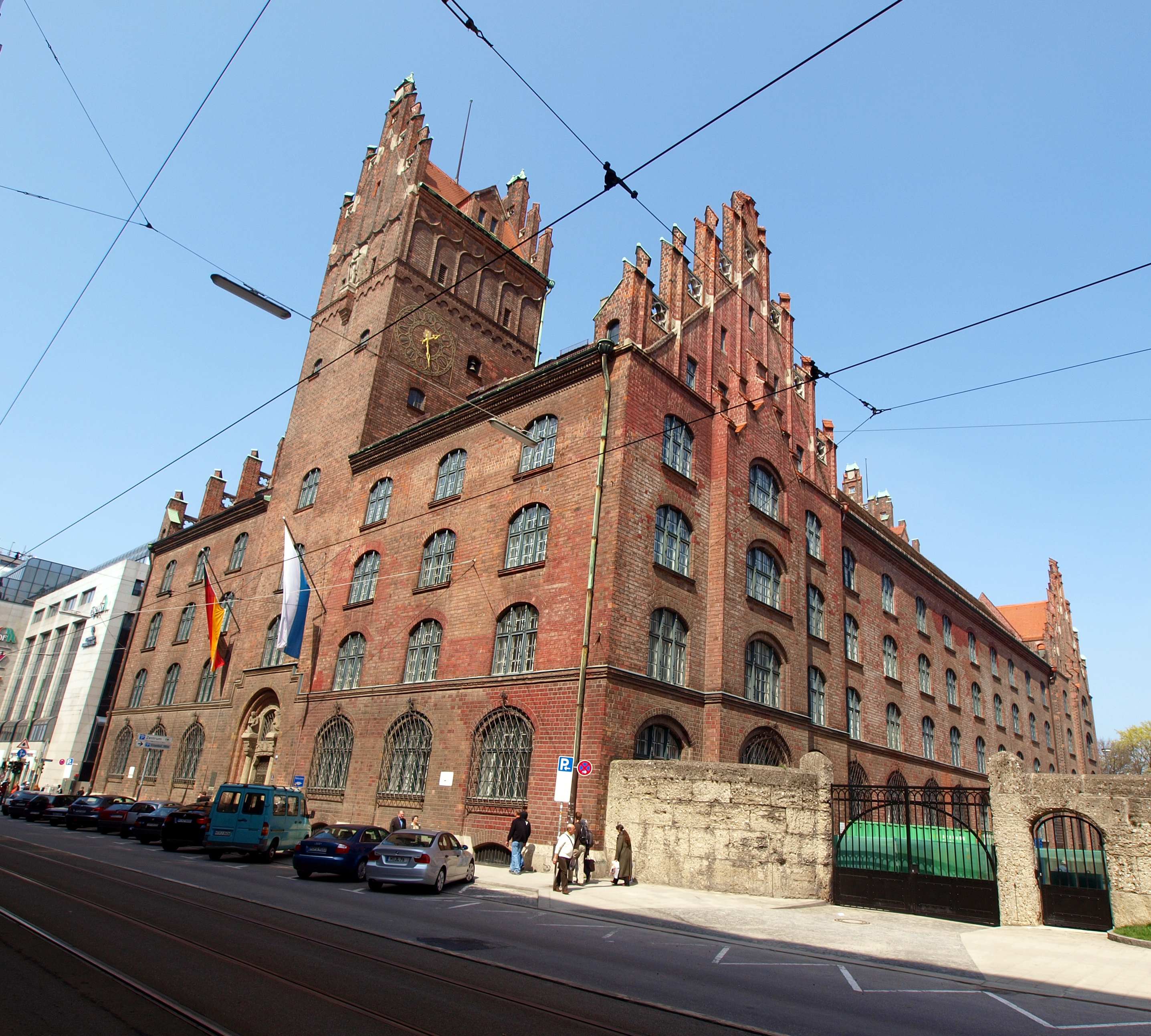 Justizgebäude Prielmayerstraße 5 in München mit Oberlandesgericht München und Bayerischem Verfassungsgerichtshof